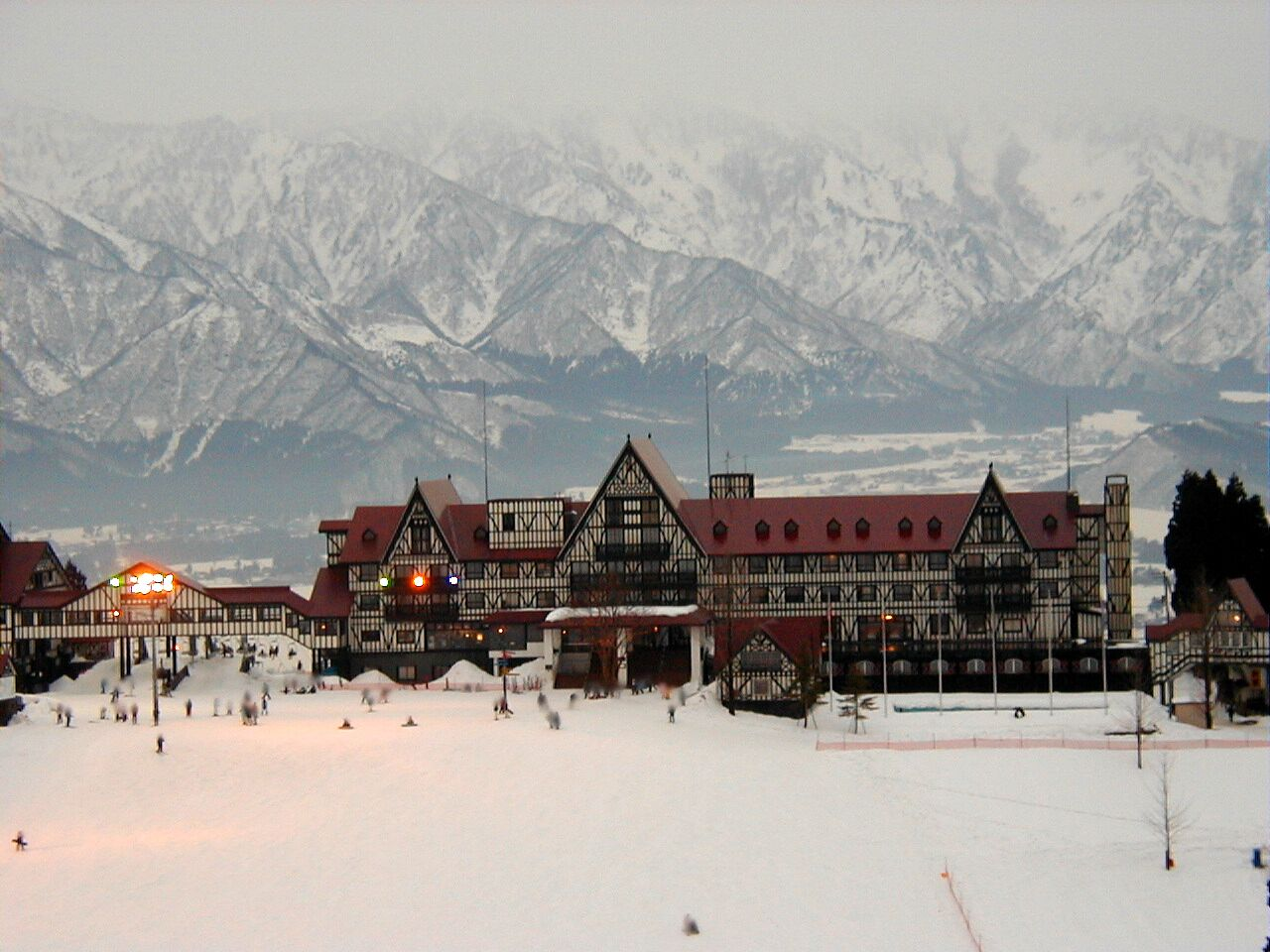 上越国際スキー場 ホテル前